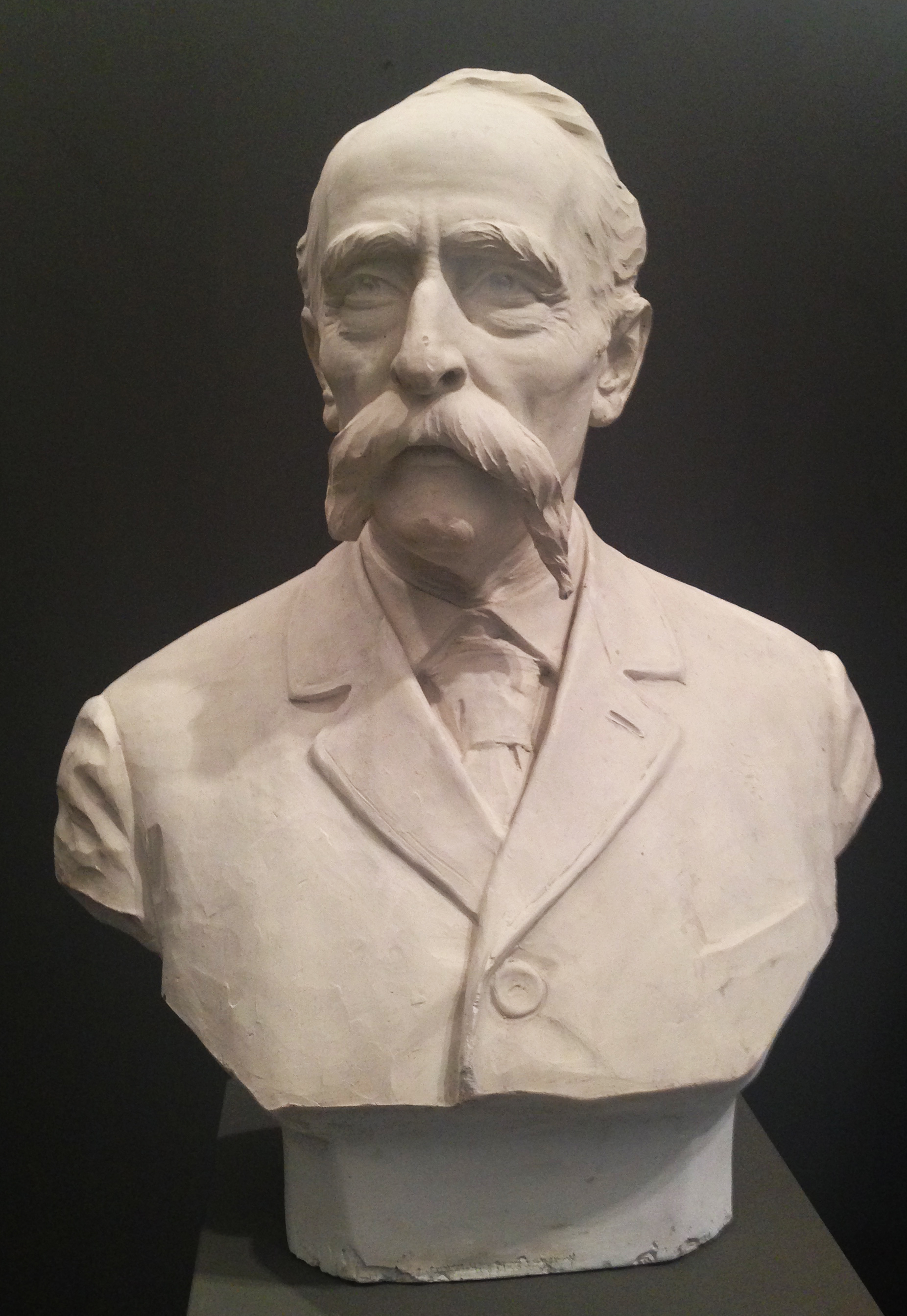 Busto in gesso di Francesco Saverio Cavallari